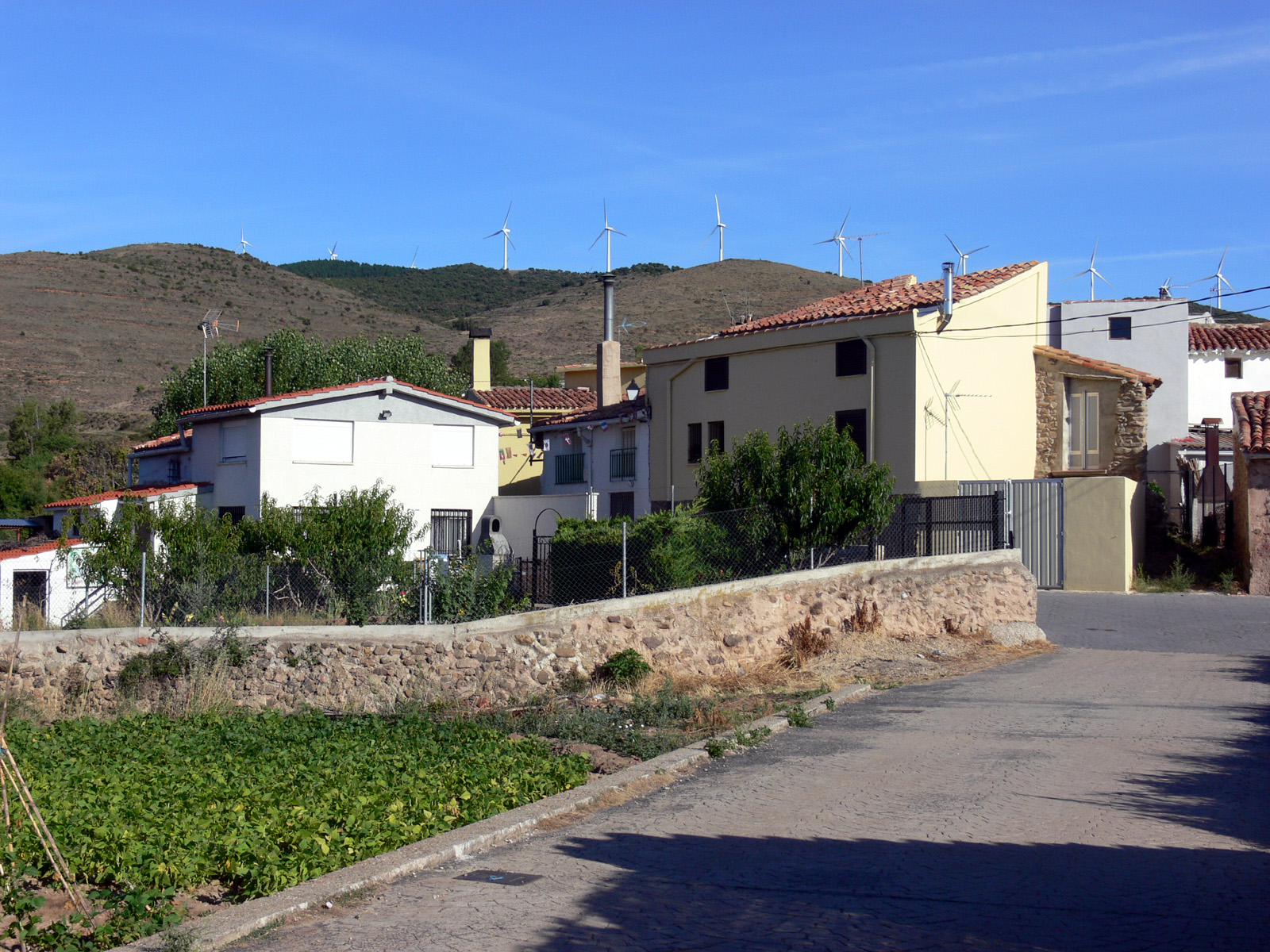 Bergasillas Somera, localidad de Bergasillas Bajera, La Rioja - España.